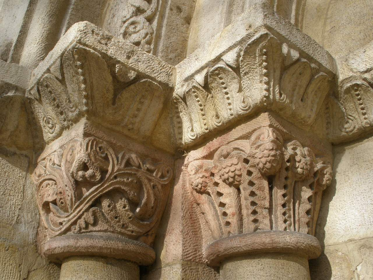 Vitoria - Abetxuko, Ermita del Santo Cristo